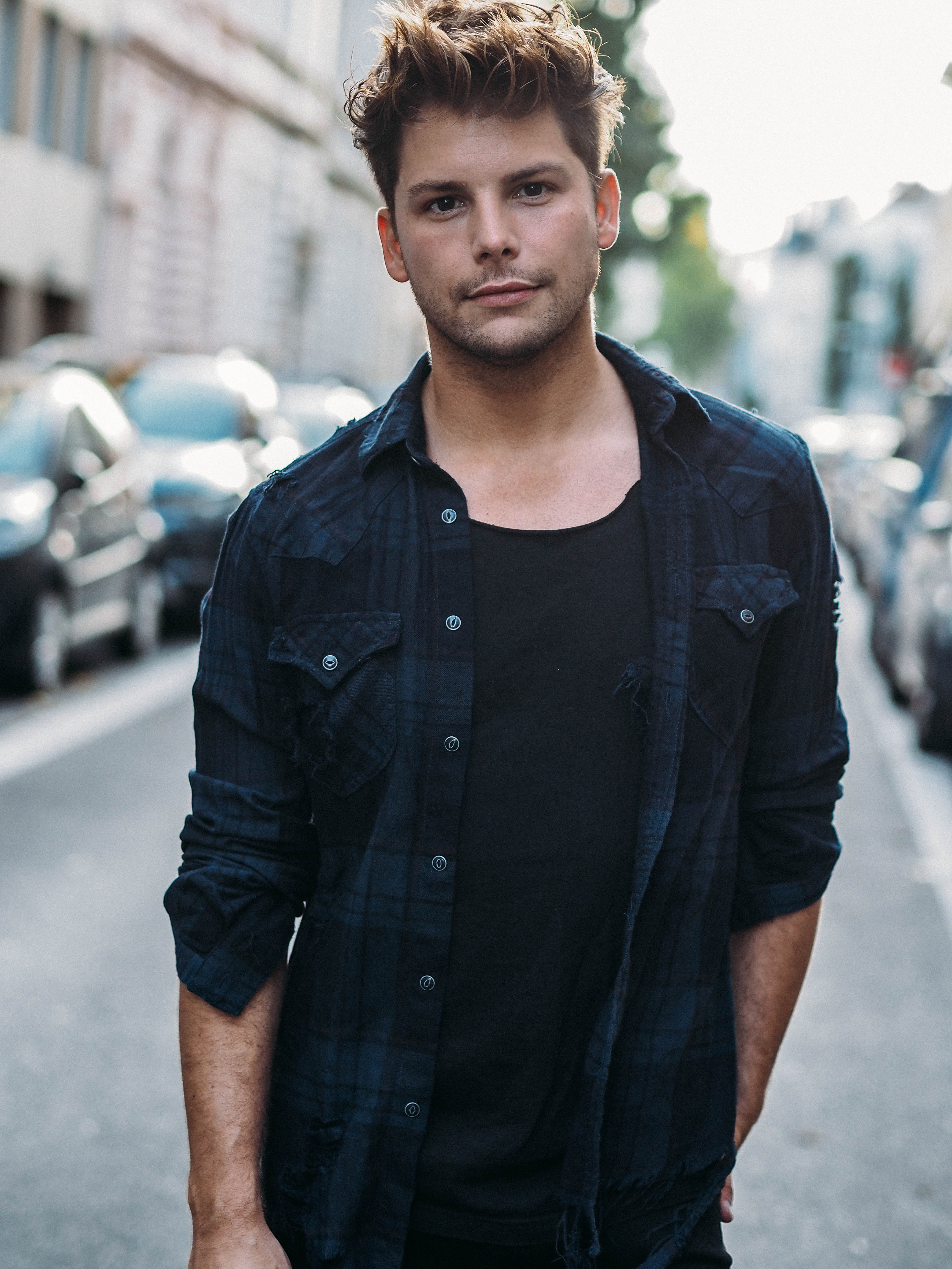 Frank in Köln